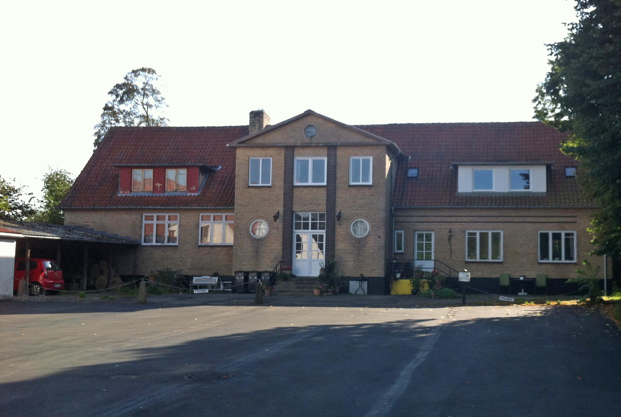 Skivums gamle skole, nu privat bolig